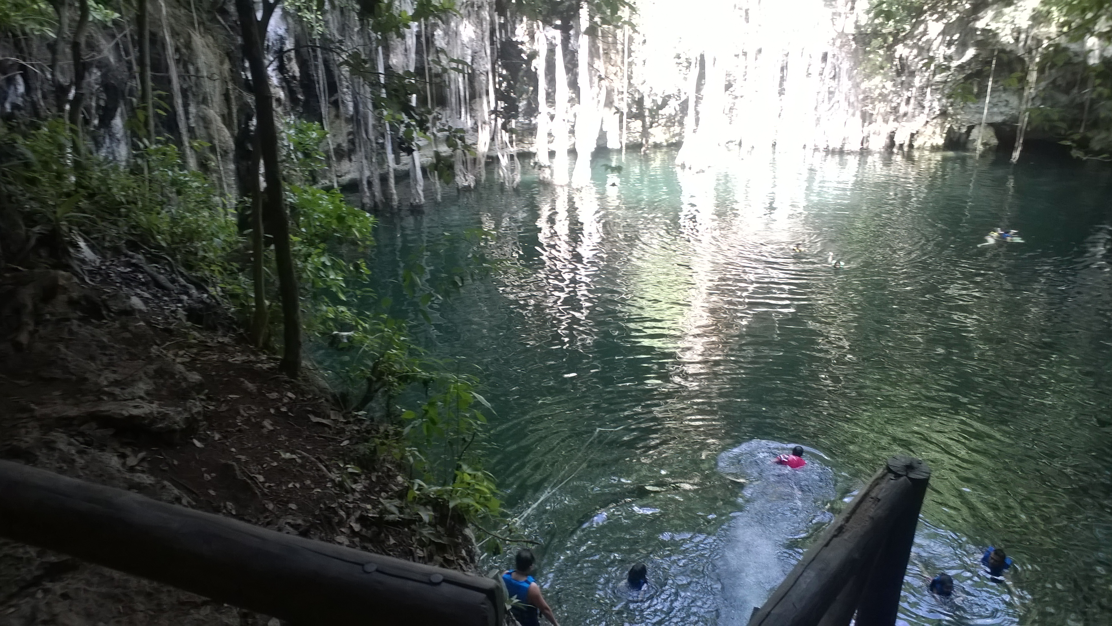 Yokdzonot-Cenote